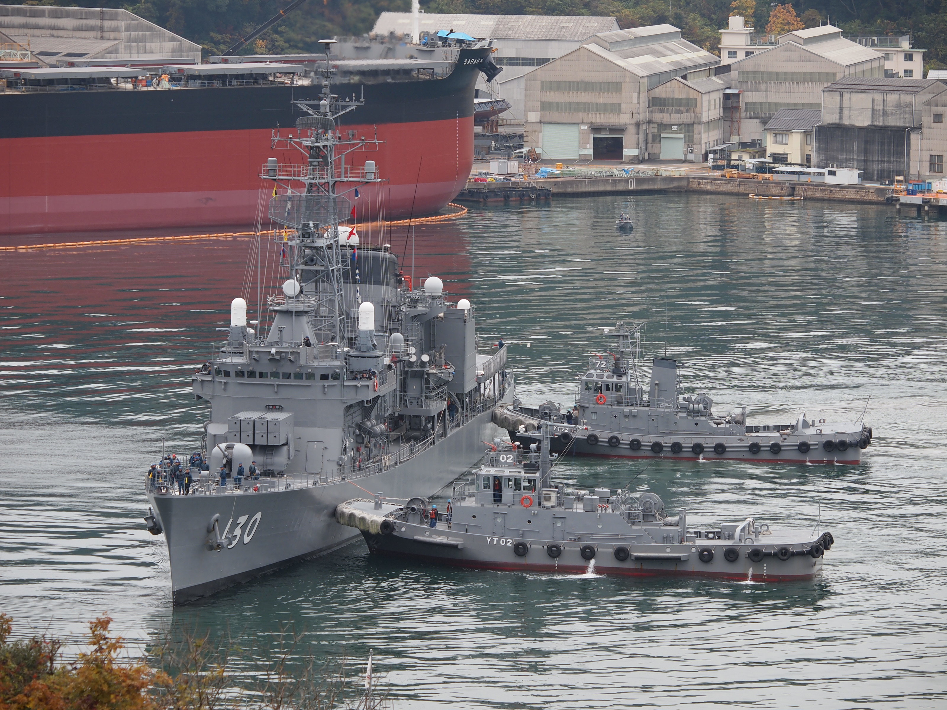 護衛艦まつゆき（DD130）の入港を支援する舞鶴港務隊YT72及びYT02